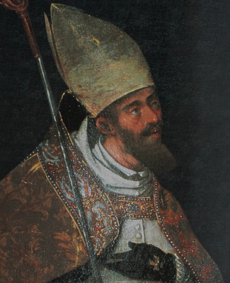 Bő nb. Mihály zágrábi püspök, esztergomi érsek 16. századi ábrázolása